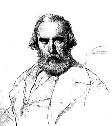 Eugène Buttura.